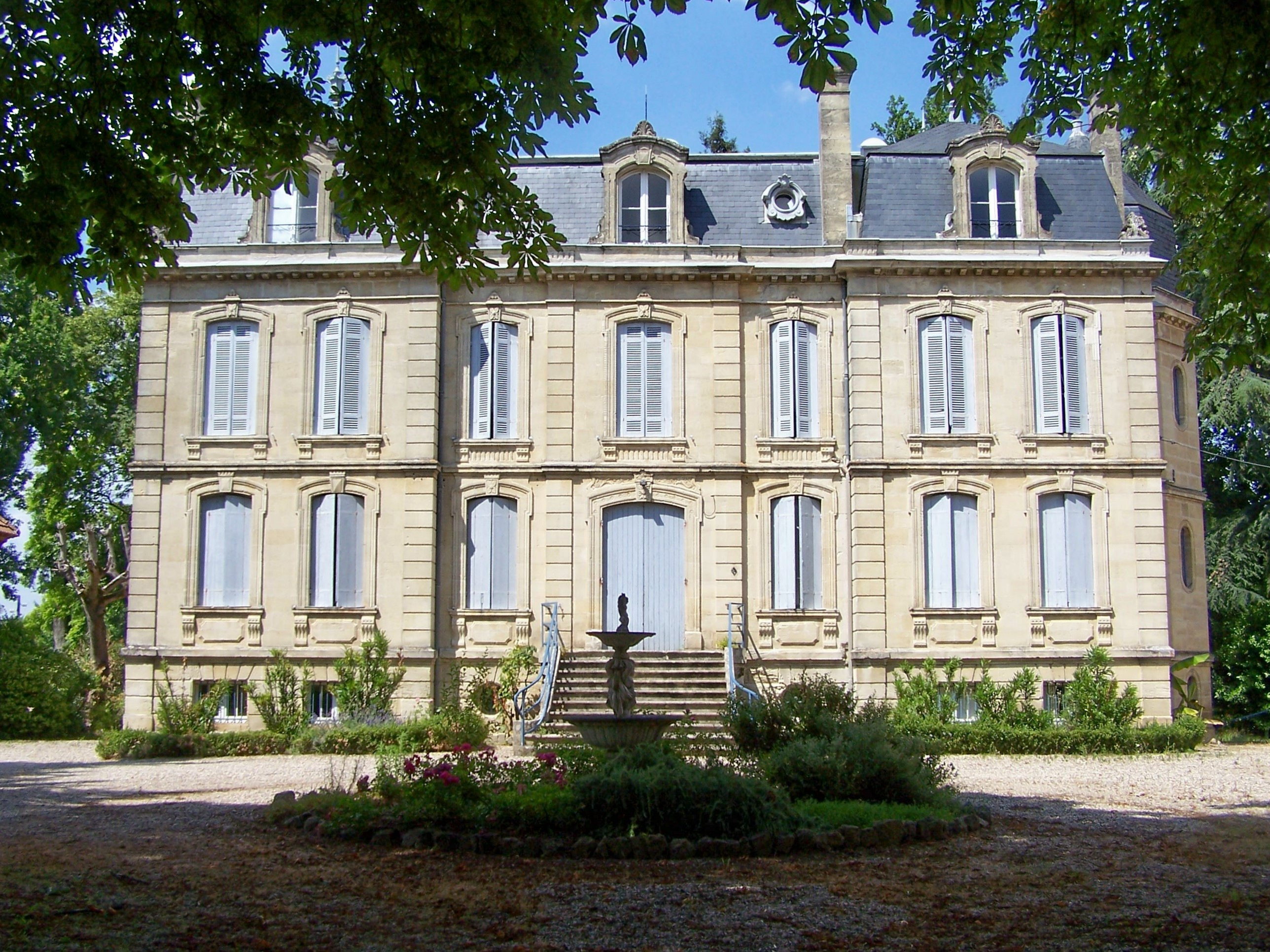 Manoir à Castets-en-Dorthe, Gironde, France